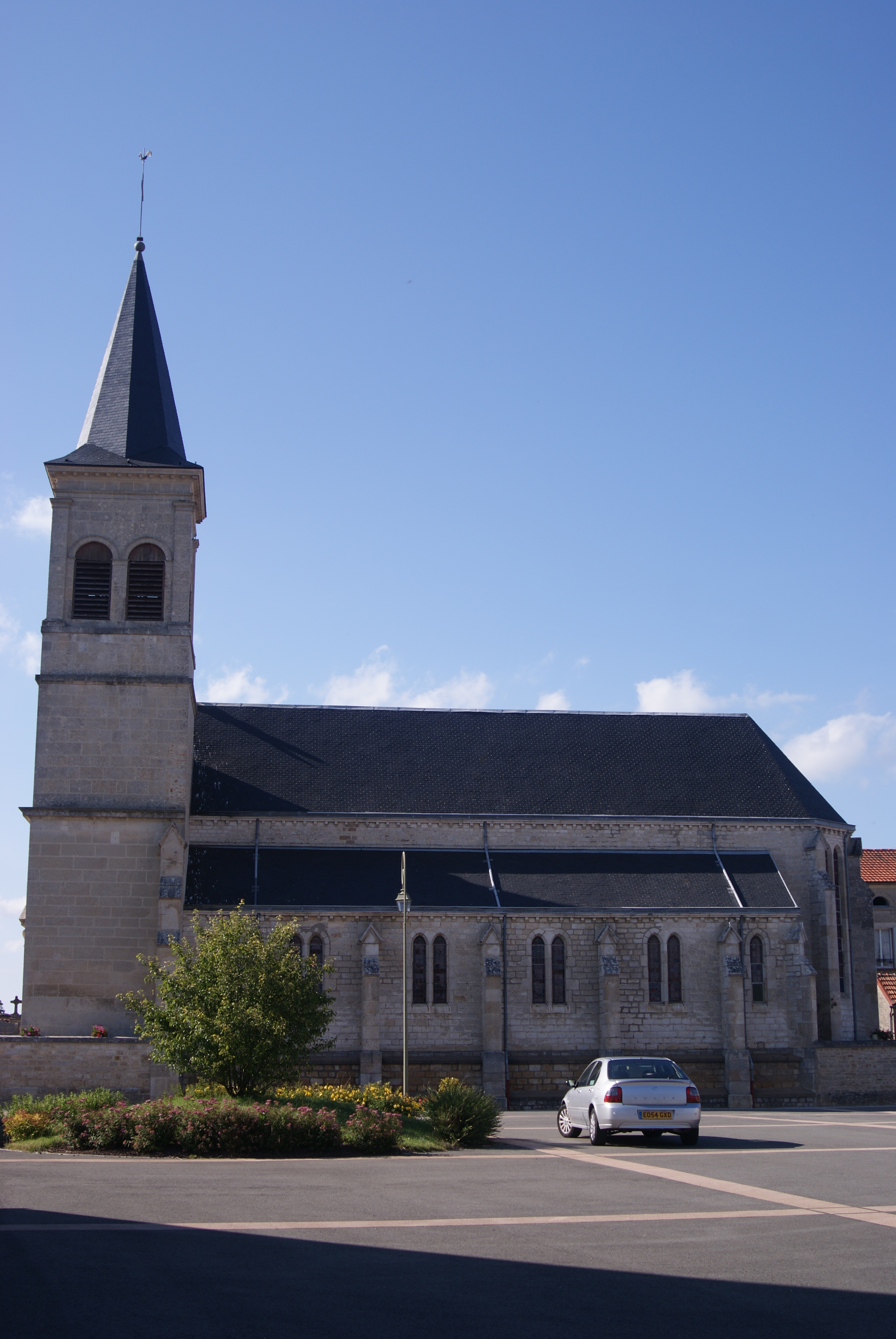 Colmier le Haut